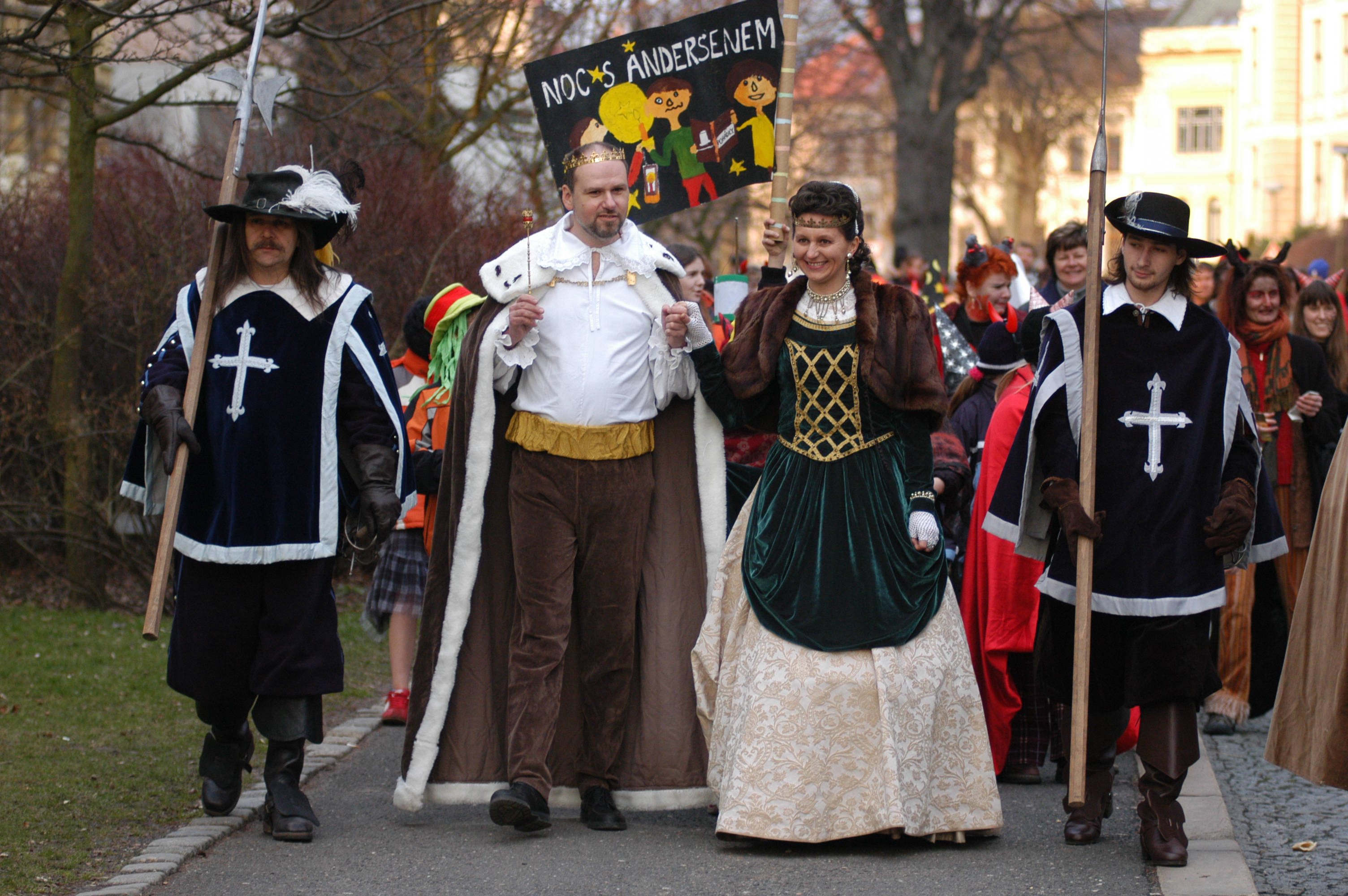 Noc s Andersenem 2